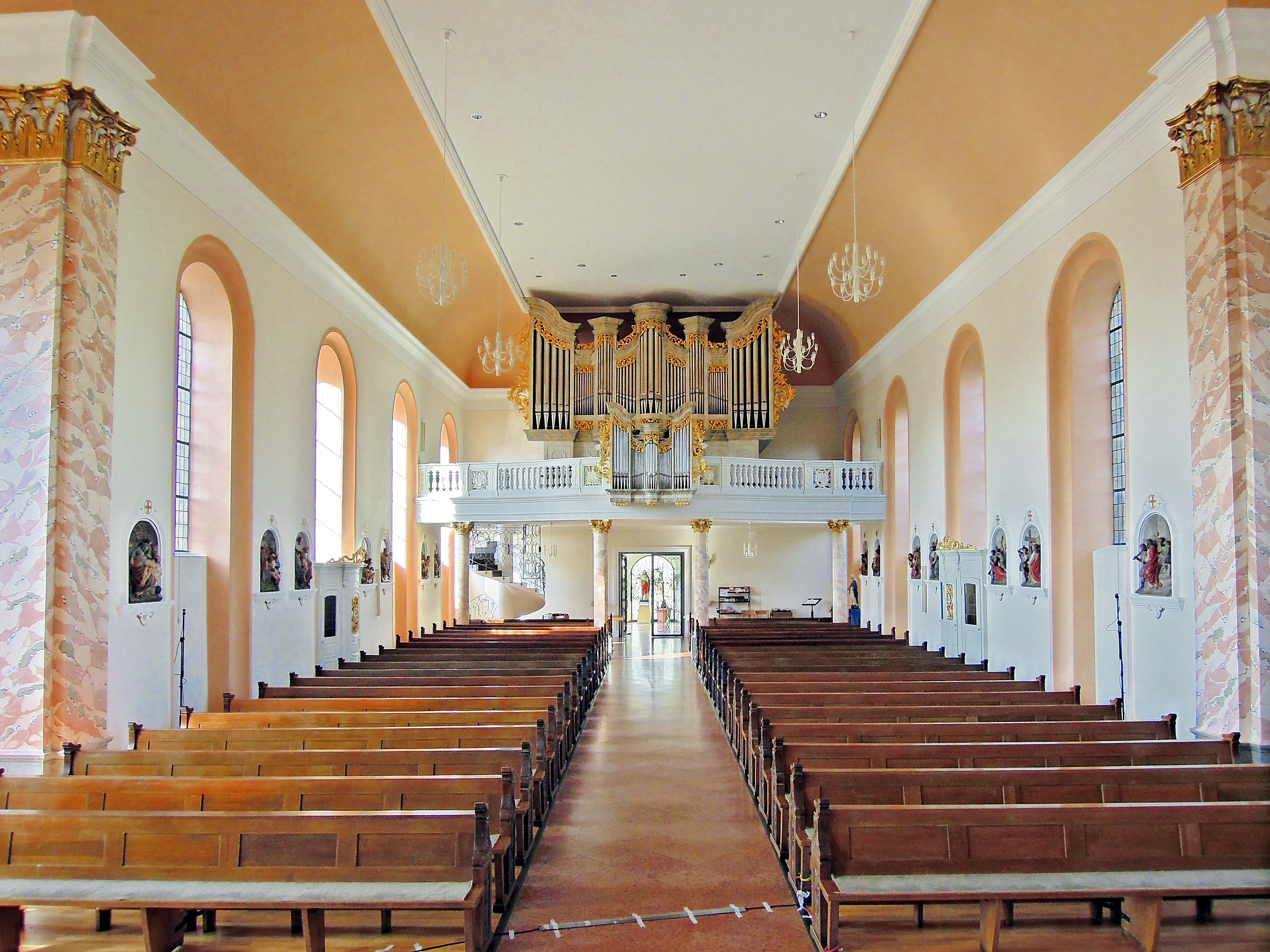 Kleinstraße, Pfarrkirche St. Crispinus und St. Crispinianus(Einzeldenkmal)